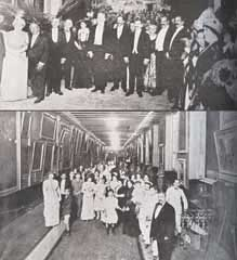 Inauguração do MNBA de Havana em 1913.